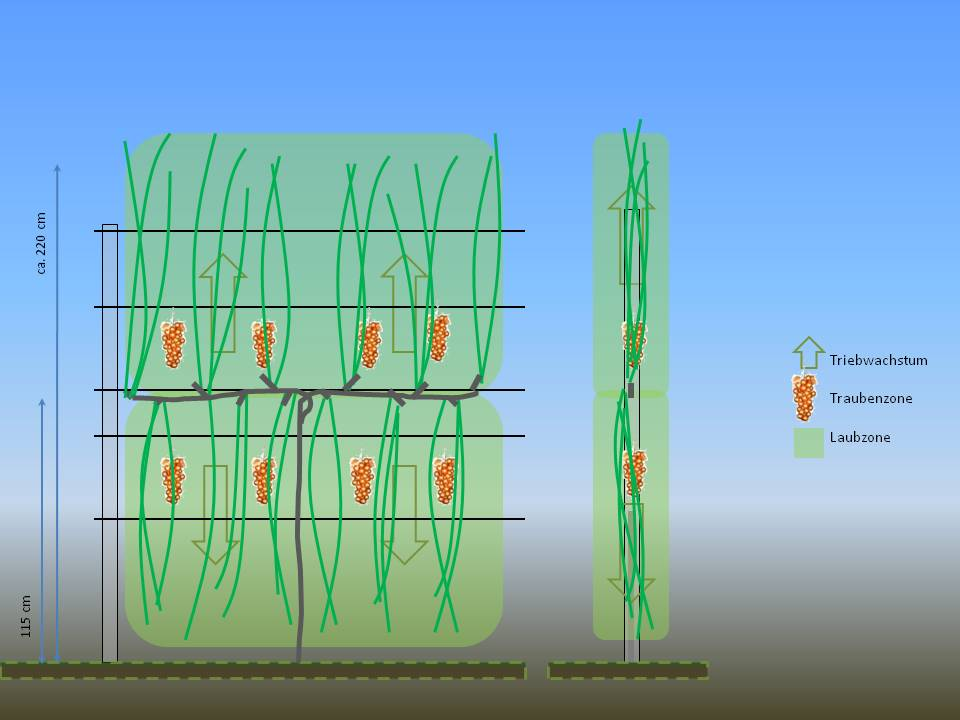 Smart Dyson Erziehung